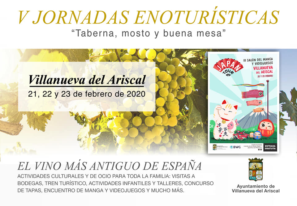 Cartel de las jornadas de 2020